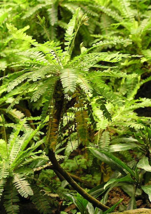 Biophytum dendroides aus dem Botanischen Garten Bonn.